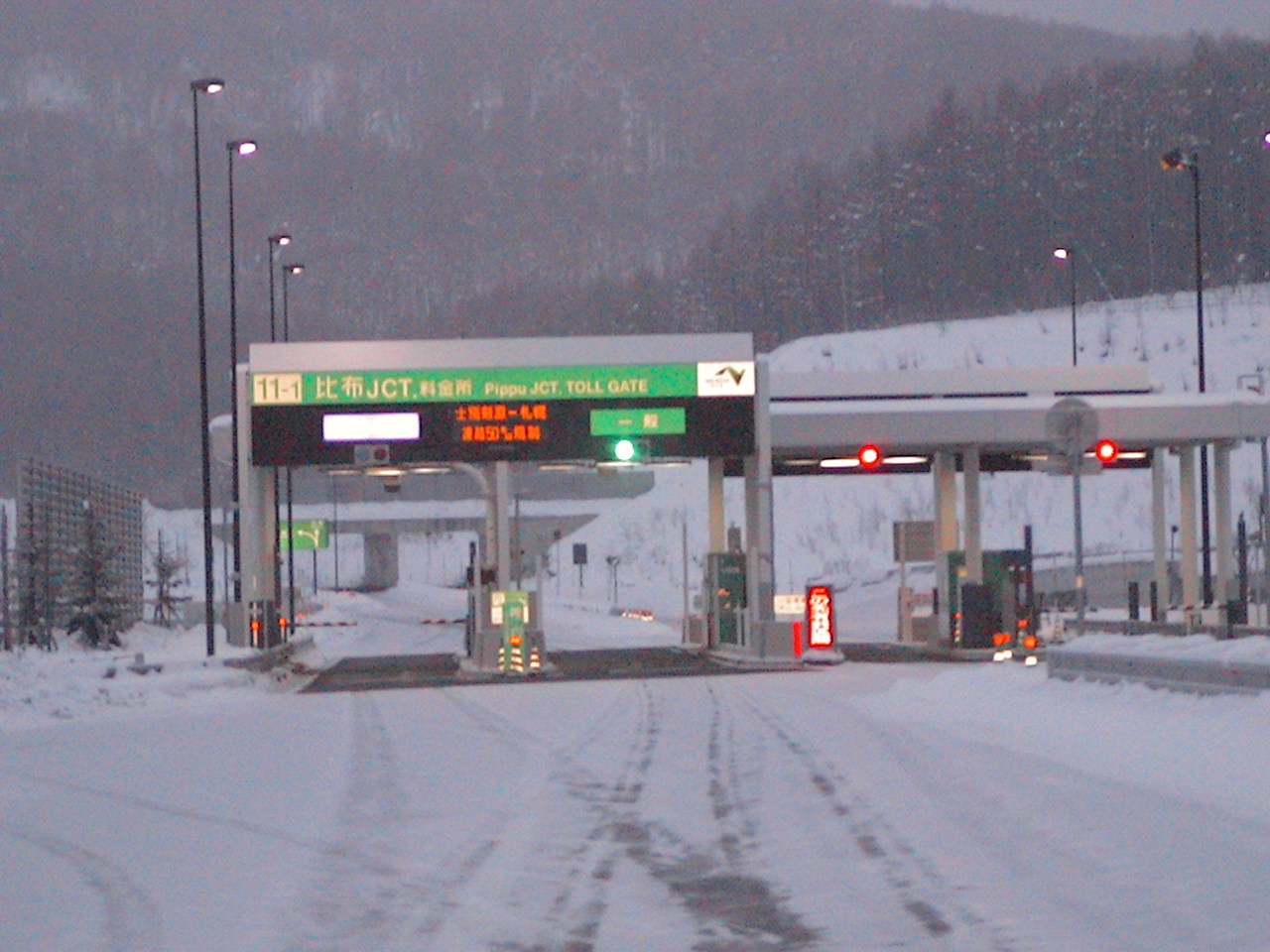 比布ジャンクション料金所（道央道方面）